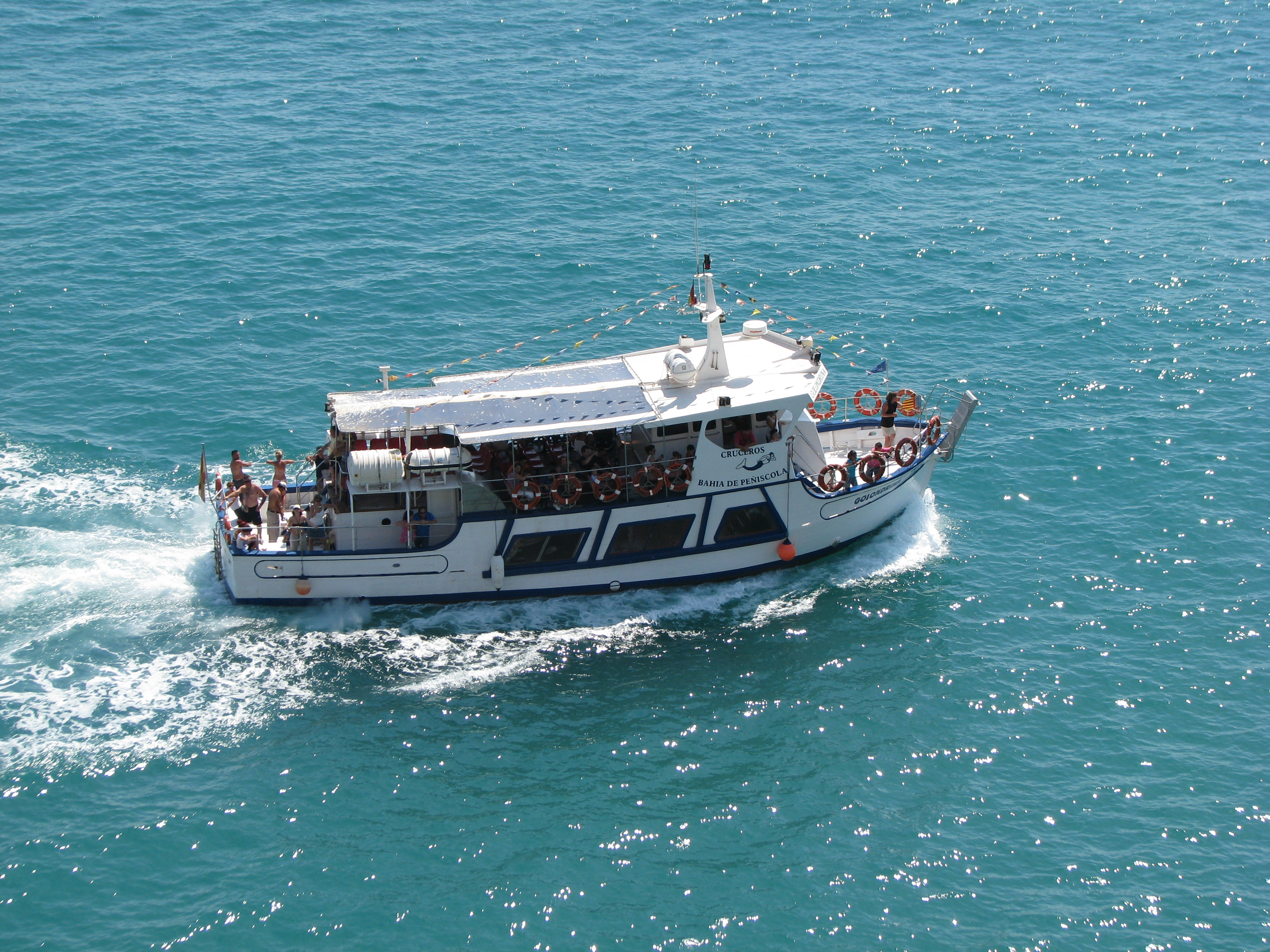 Golondrina en Peñiscola.